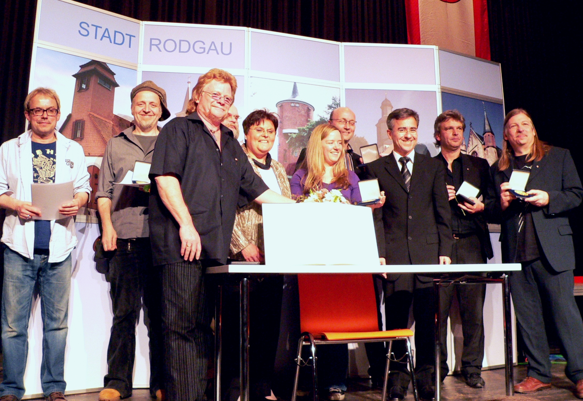 Rodgau Monotones nach der Verleihung der Bürgermedaille in Gold durch die namensgebende Stadt Rodgau. Rechts und links von Kerstin Pfau (Mitte) die Stadtverordnetenvorsteherin und der Bürgermeister der Stadt. Links außen Hendrik Nachtsheim (Badesalz)